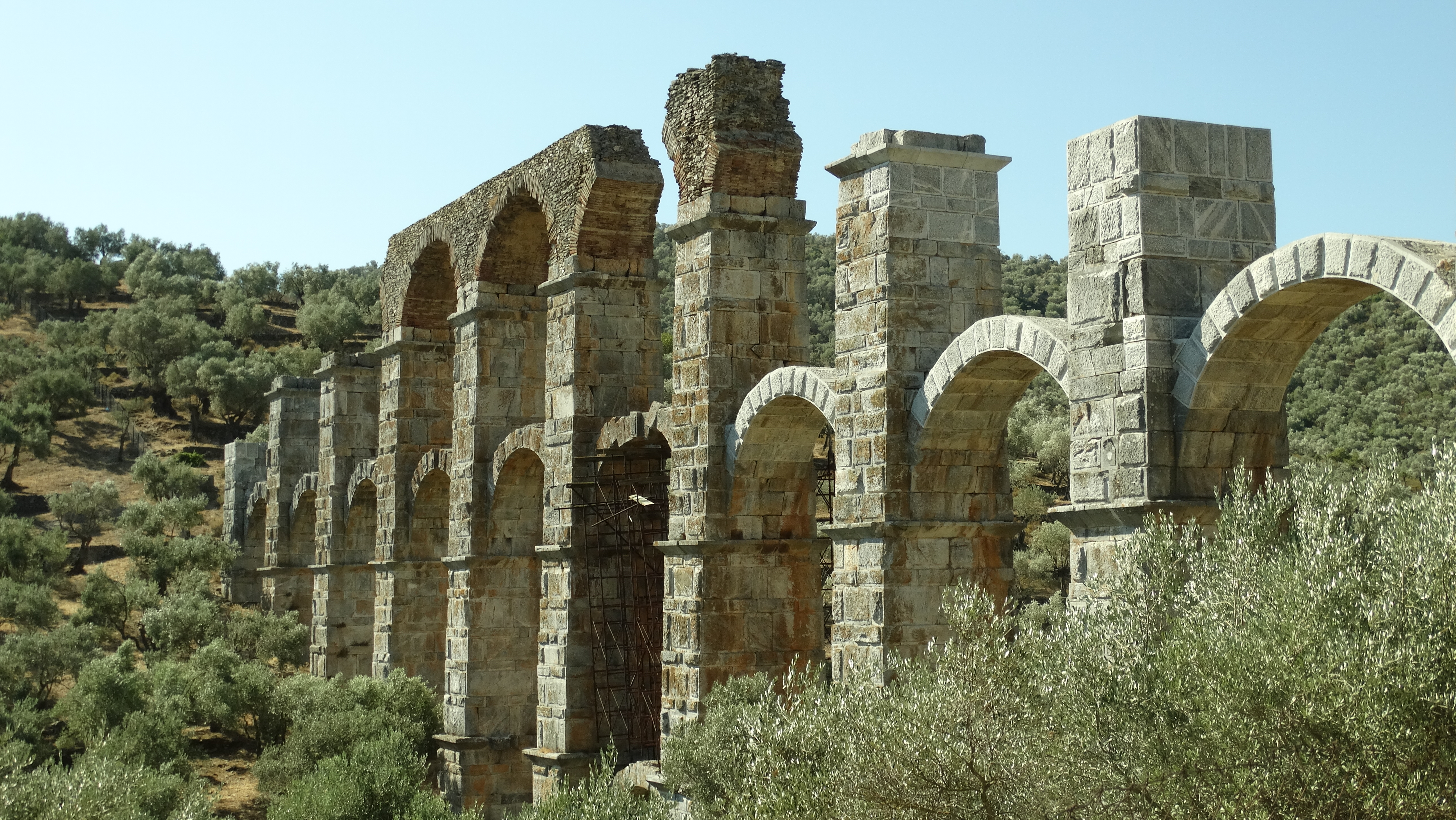 Ρωμαϊκό Υδραγωγείο Μόριας«Ρωμαϊκό Υδραγωγείο Μόριας»